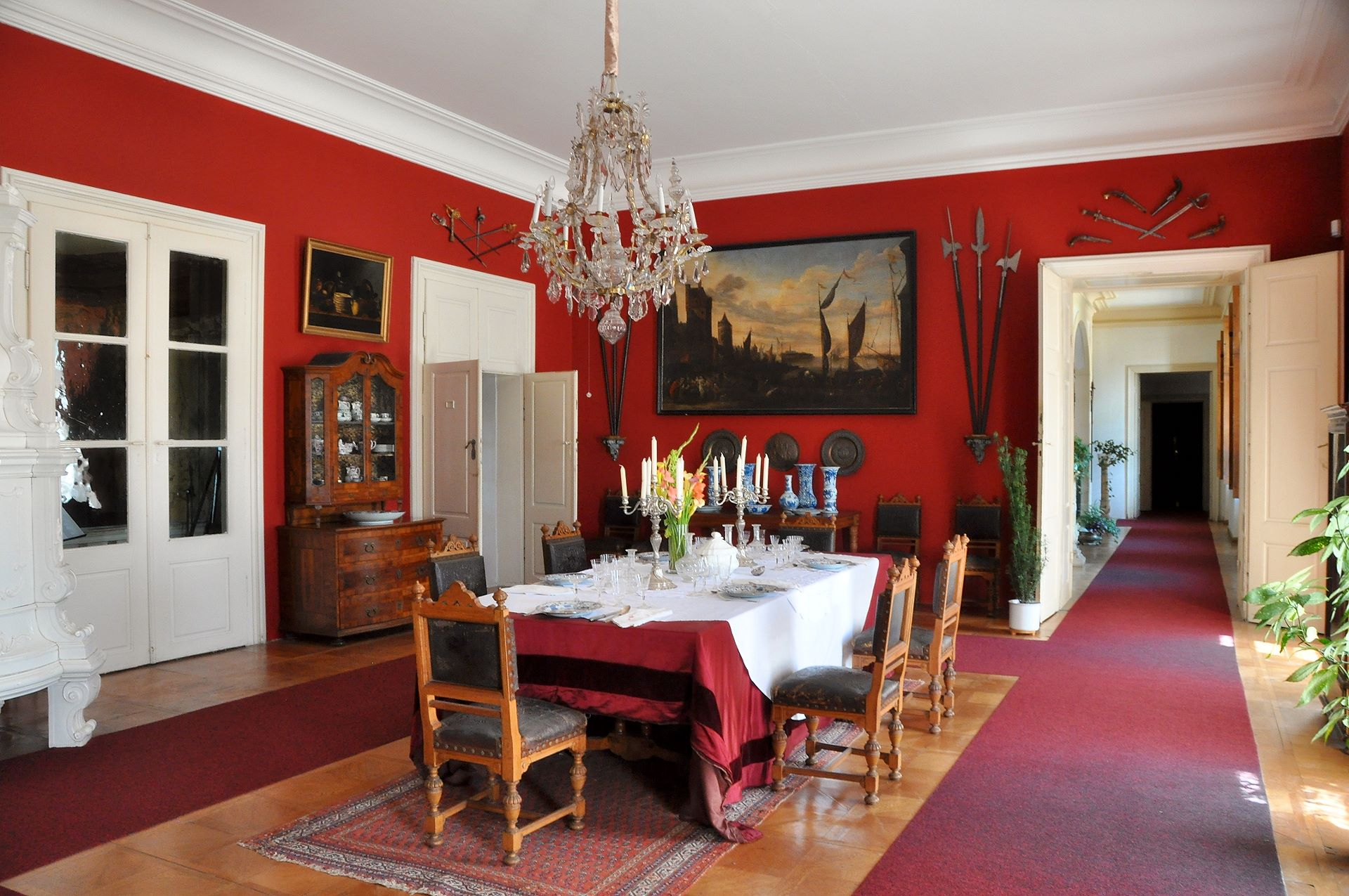 Schloss Rajec nad Svitavou